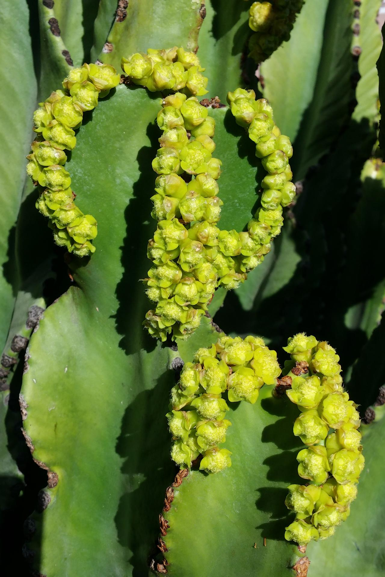 Blühende Wolfsmilch